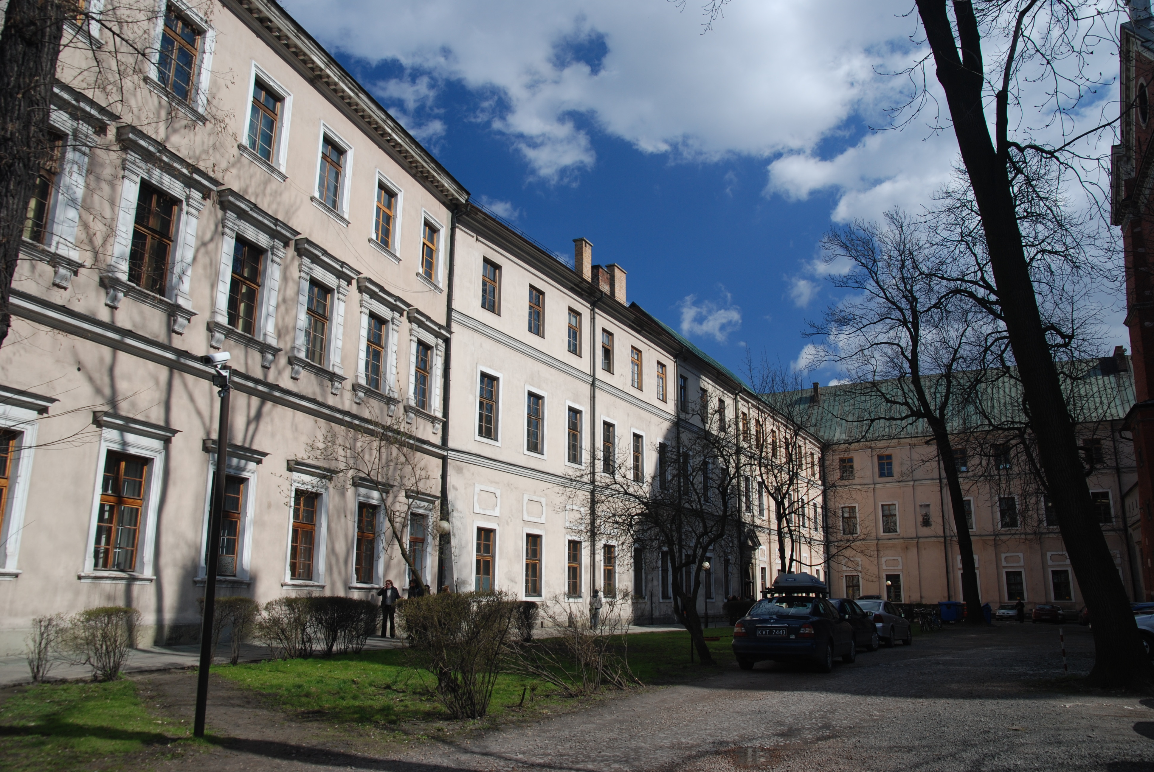 Collegium Broscianum, Kraków, Poland